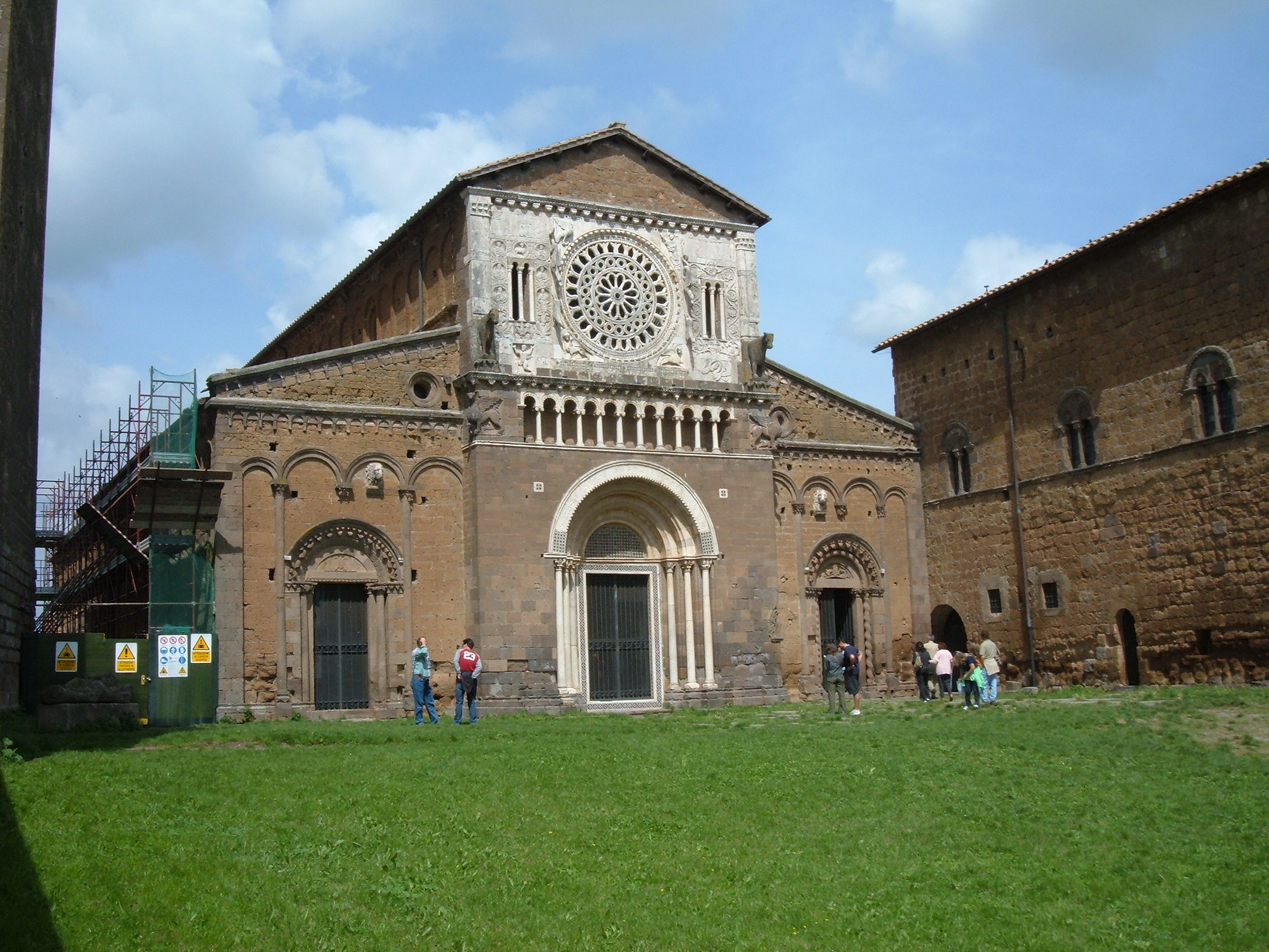 Basilique de Saint Pierre, à Tuscania, province de Viterbo.